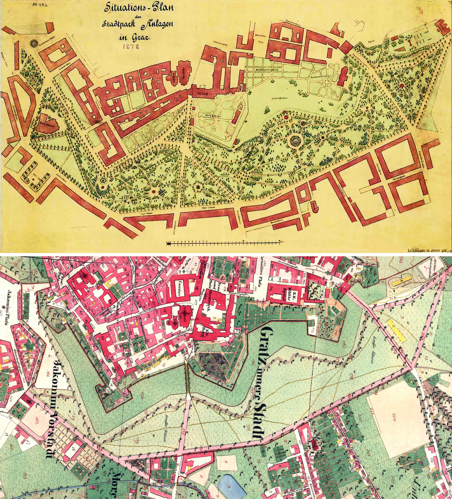 Steiermark, Graz, Innere Stadt, Grazer Stadtpark, Situationspläne im Vergleich